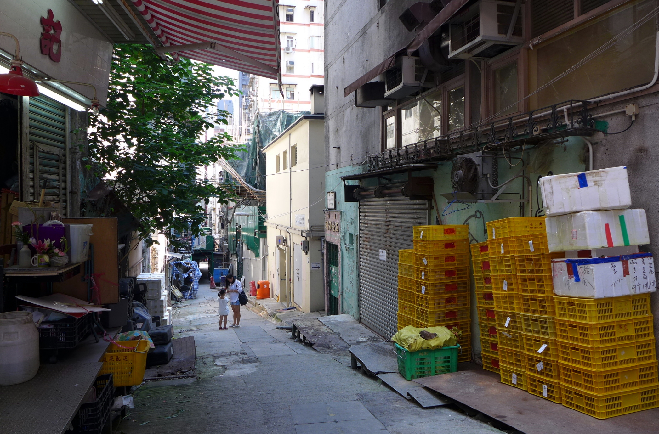 Gutzlaff Street